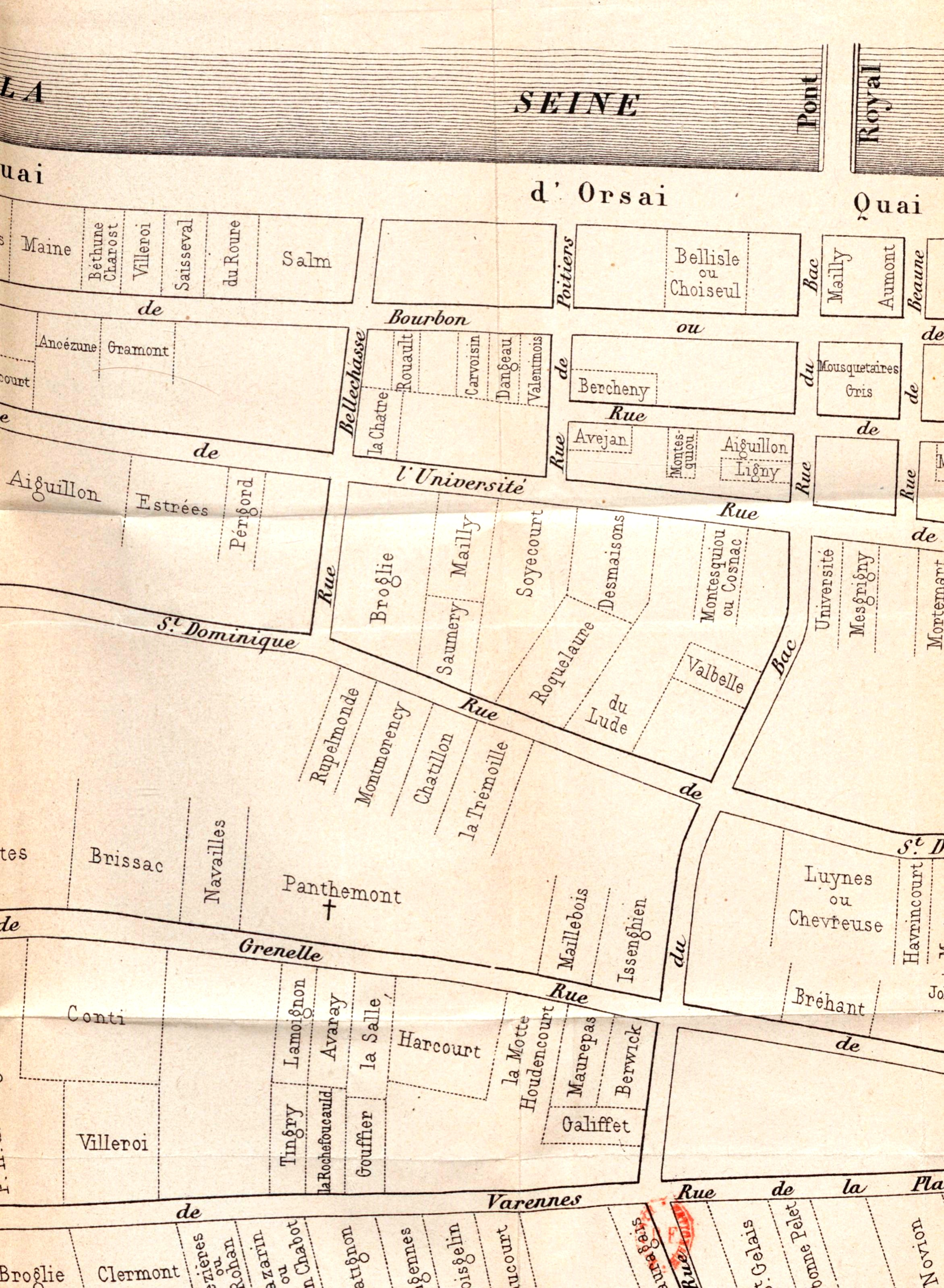 Plan établi par le comte d'Aucourt en 1880 de la disposition des hôtels particuliers du faubourg Saint-Germain tel qu'il était au XVIIIe siècle.